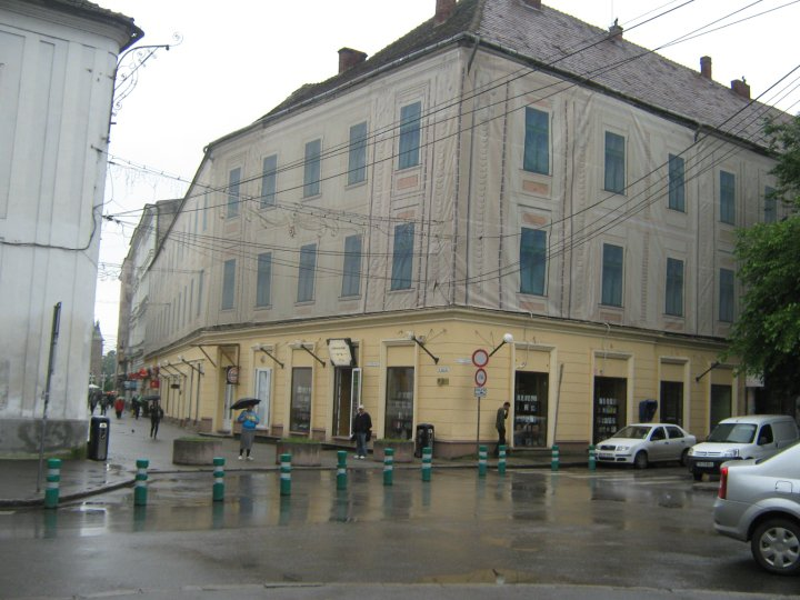 Casa de Persida Stoicovici Macri din Timisoara